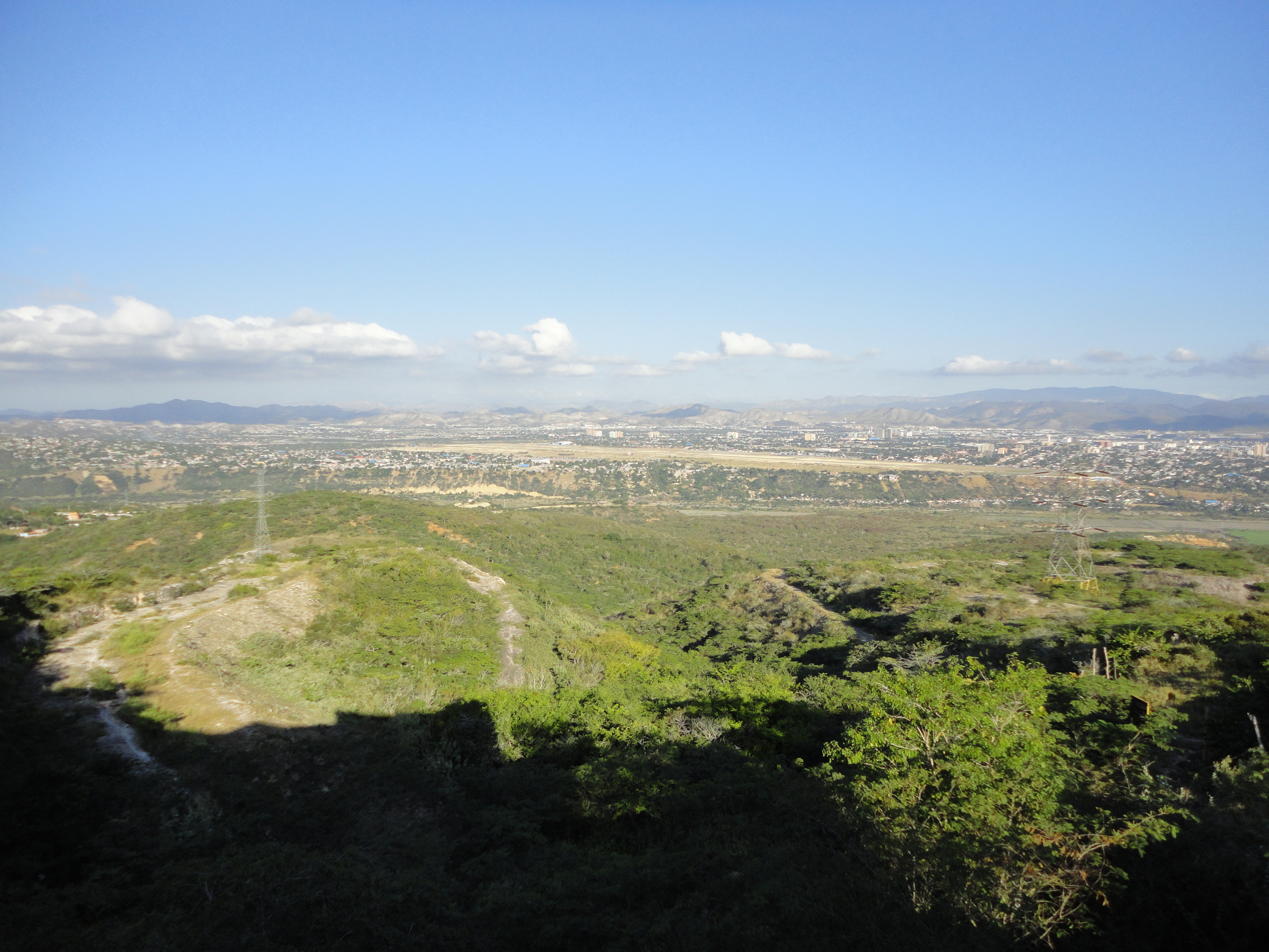 Aeropuerto Barquisimeto